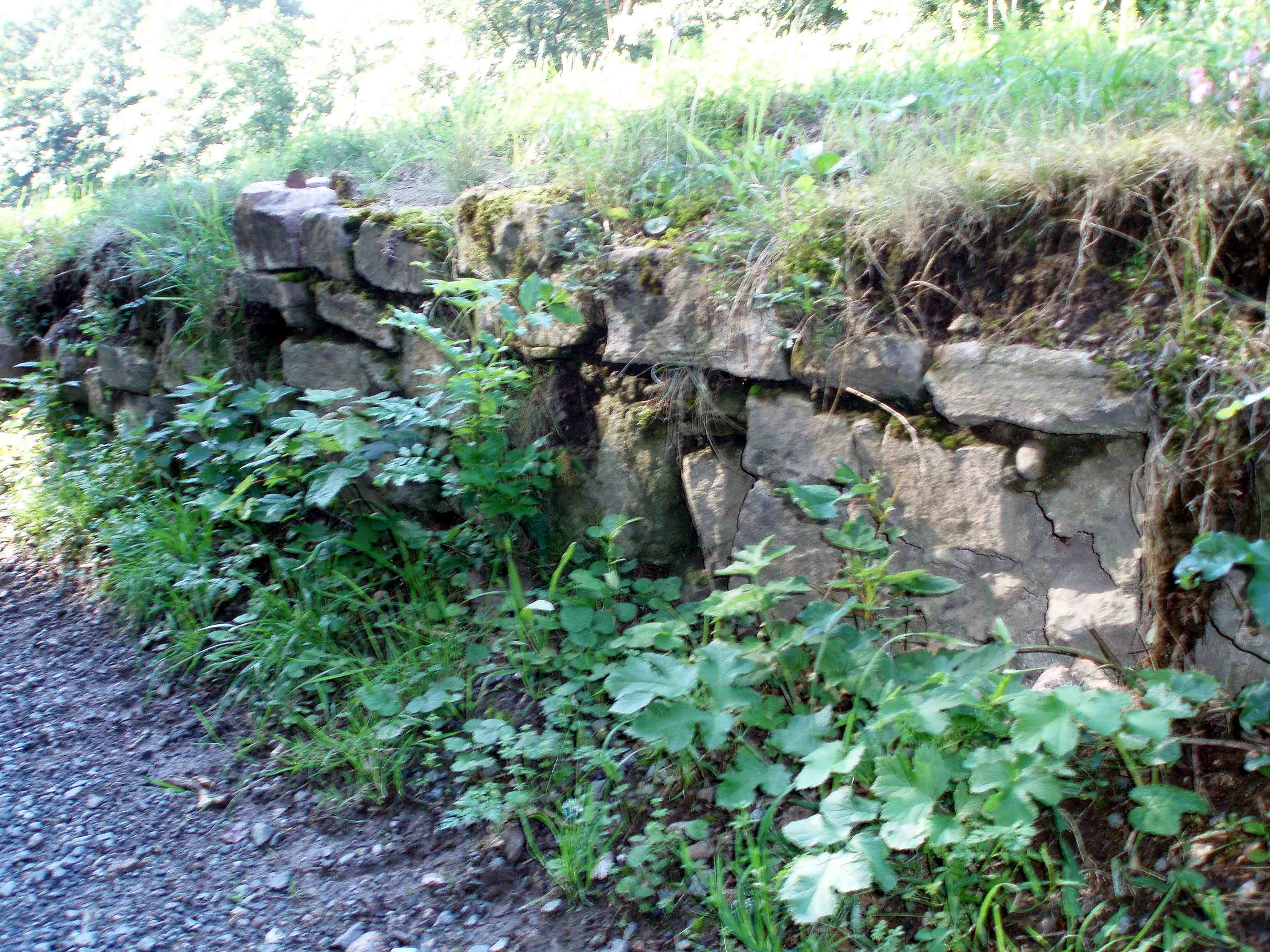 Reste der Mauern der Klosters Himmelpforten